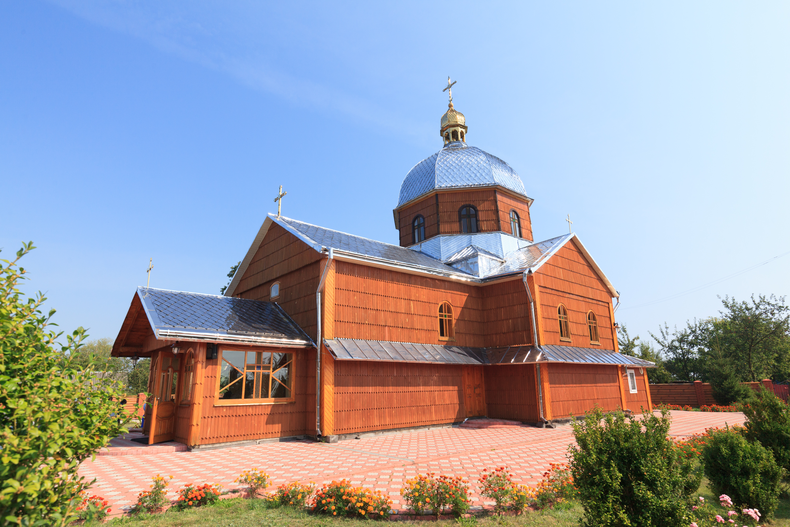 Церква Св.Івана Хрестителя(дер.), с.Воля(Глинецька)